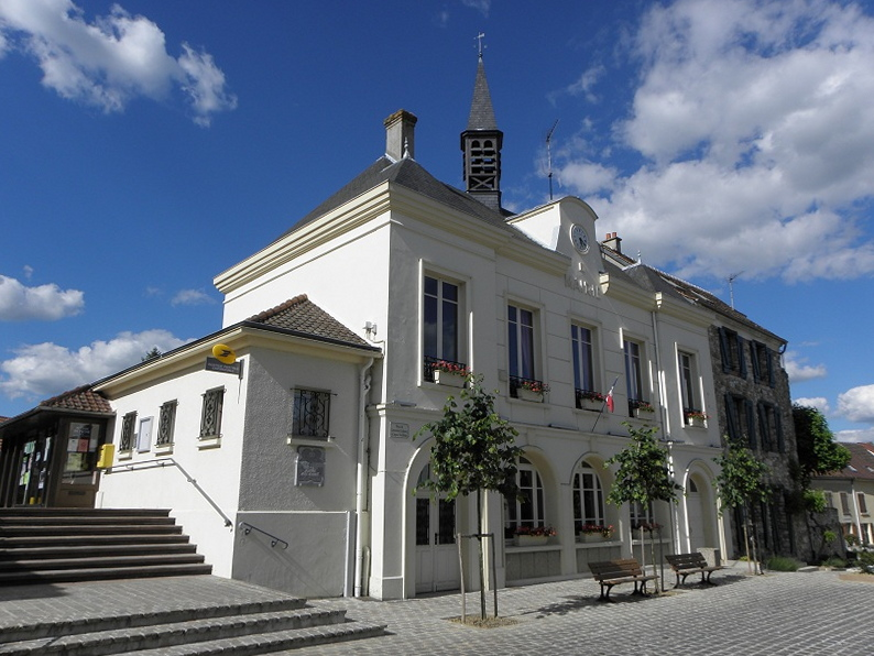 Mairie de Chézy-sur-Marne (02).